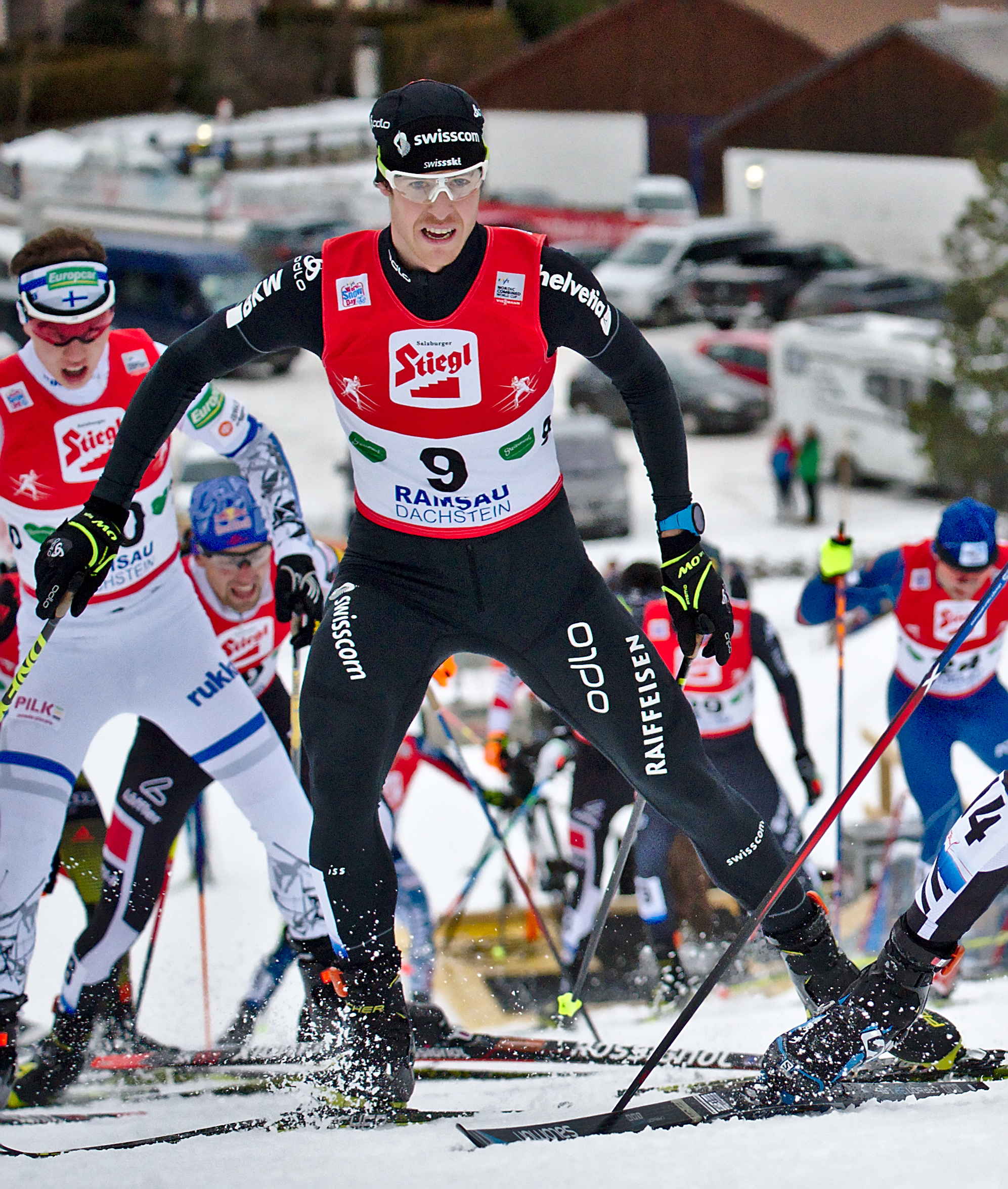 FIS Worldcup Nordic Combined Ramsau 2016. Bild zeigt Tim Hug (SUI)